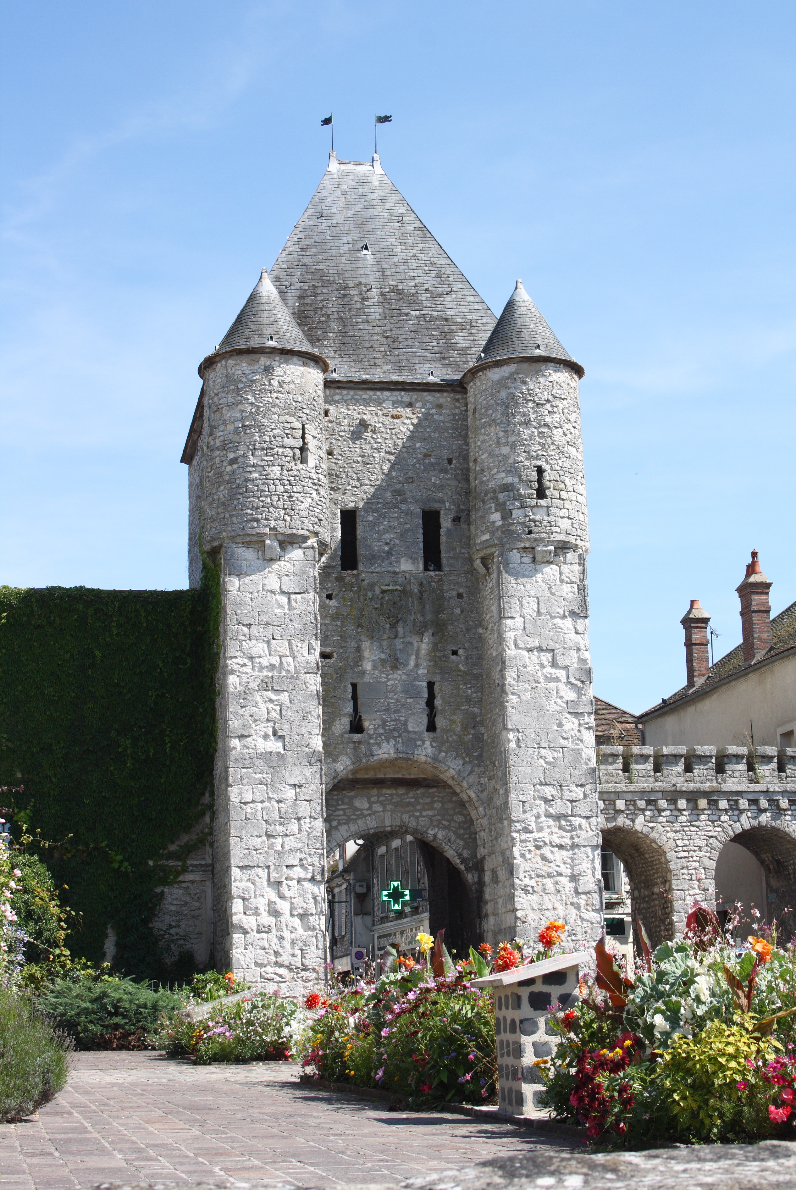 Porte de Samois in Moret-sur-Loing im Département Seine-et-Marne (Île-de-France)